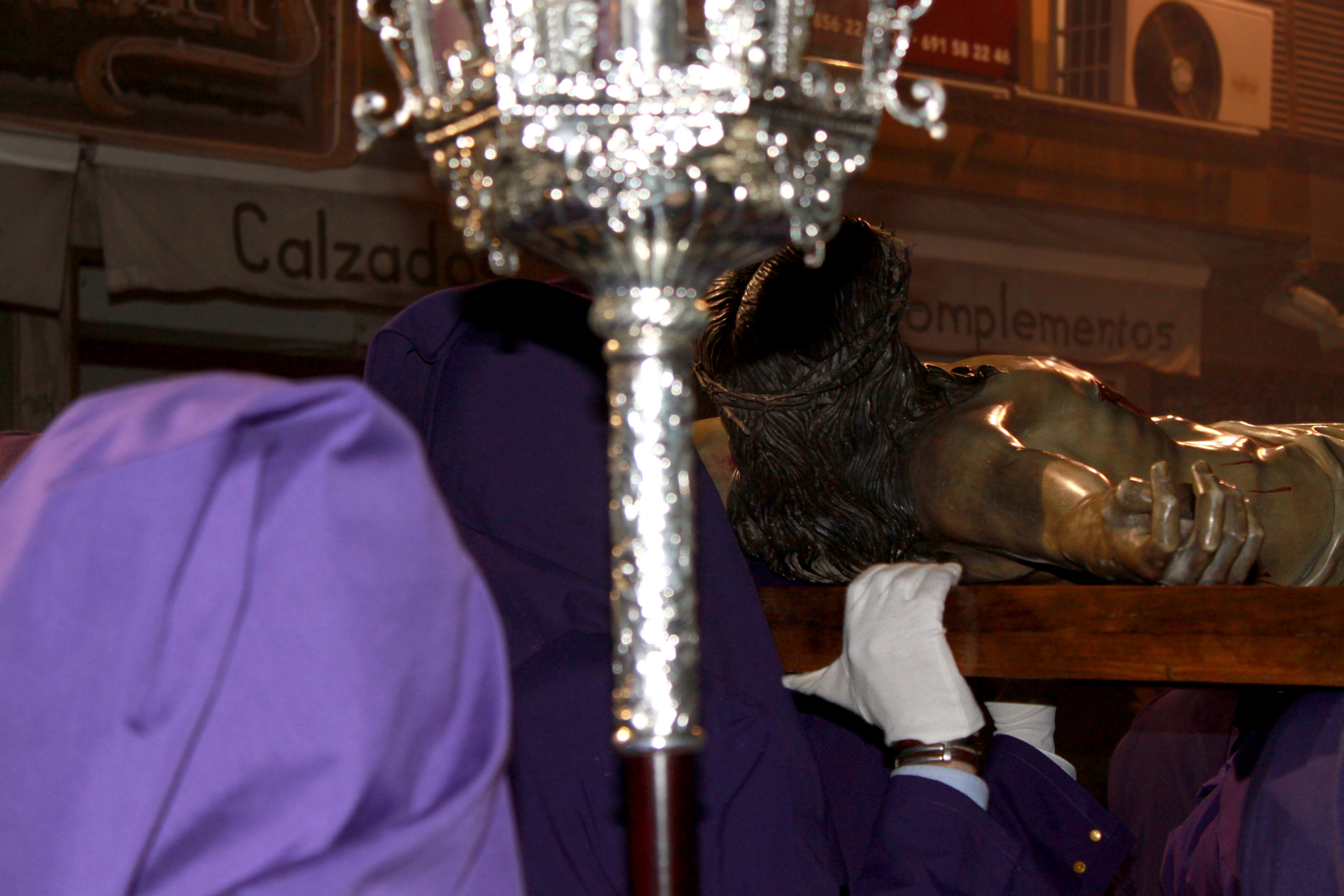 Procesión de el Cristo de la Fe de Algeciras durante la Semana Santa de 2010. Algeciras, Andalucía España.